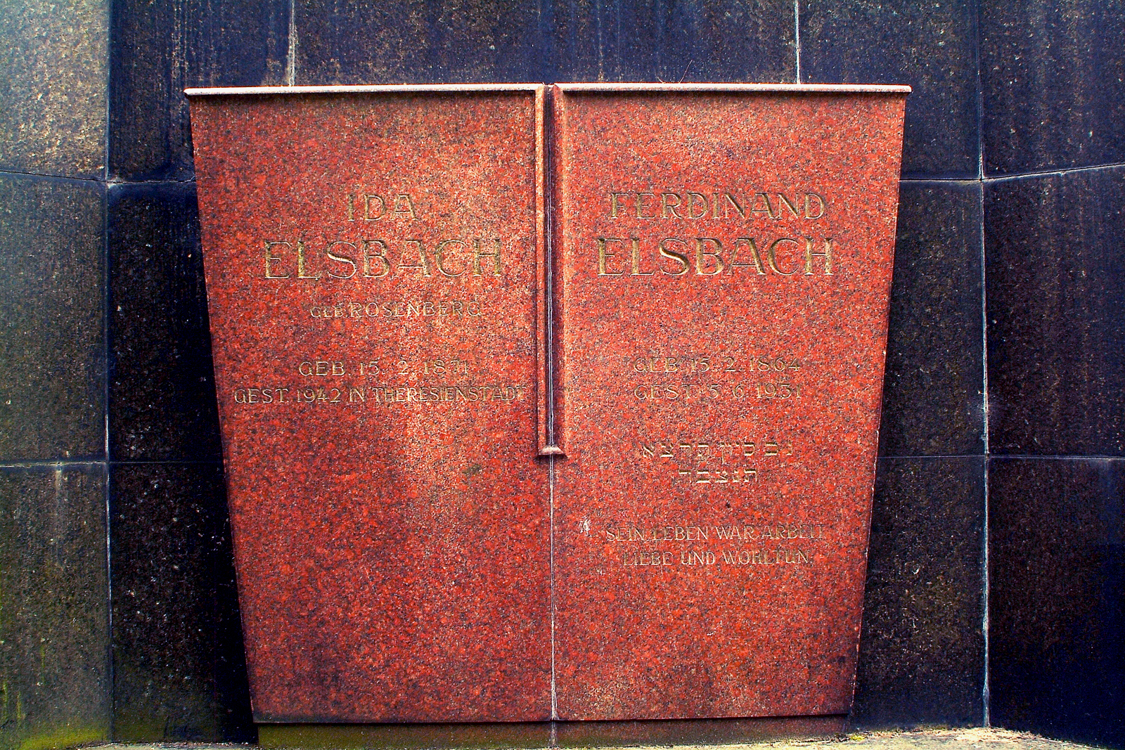 Detail des Grabmals mit den Geburts- und Sterbedaten von Ferdinand Elsbach, geboren am 15. Februar 1864, gestorben am 5. Juni 1931, und Ida Elsbach, geborene Rosenberg, geboren am 15. Februar 1871, gestorben 1942 in Theresienstadt ...